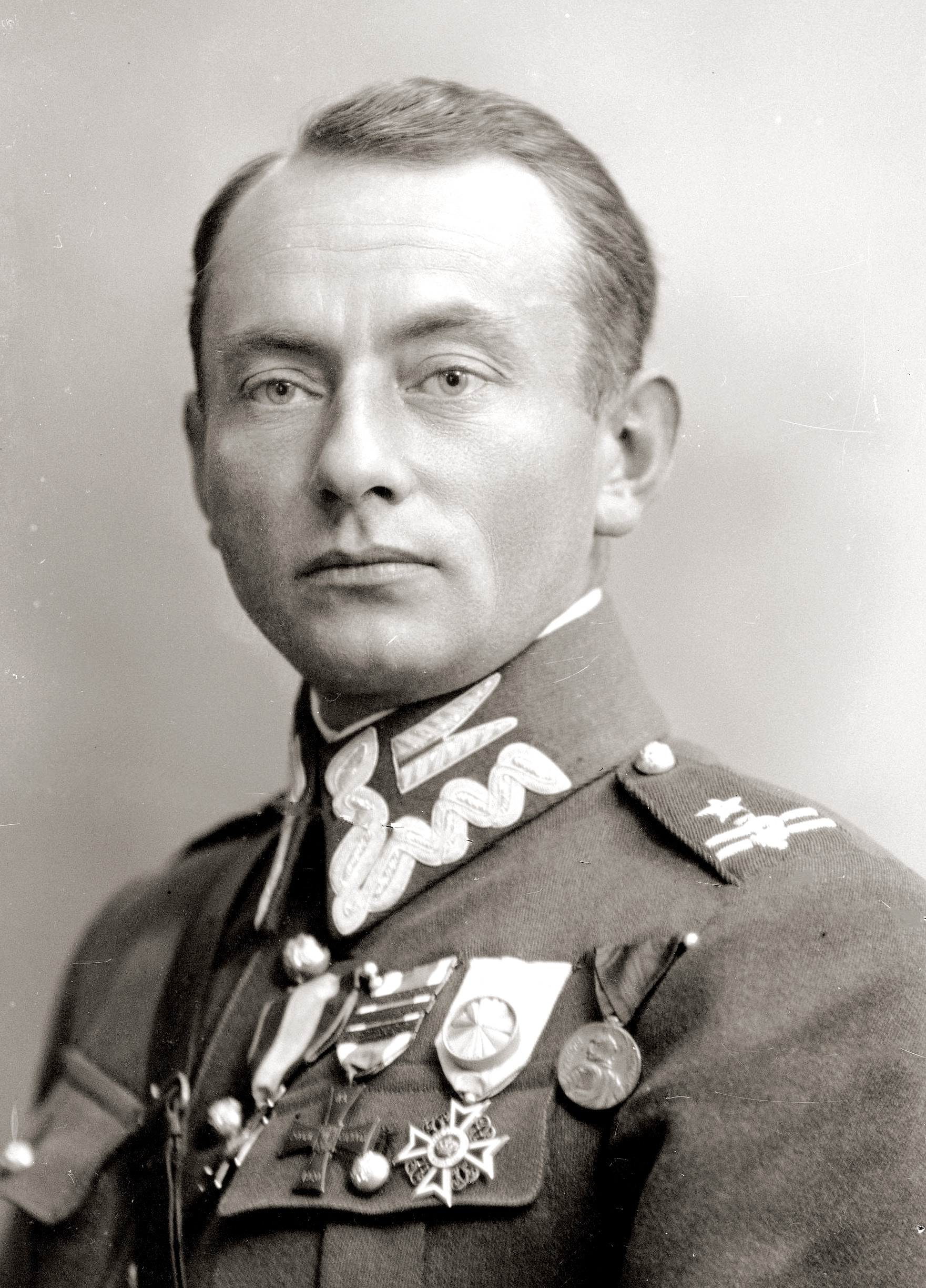 Kazimierz Mastalerz, major - fotografia portretowa.